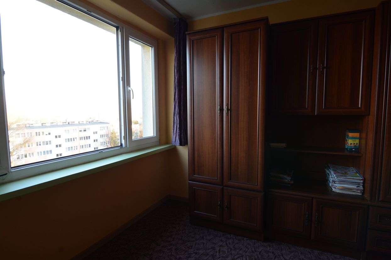 Zdjęcie wykonane bez użycia techniki HDR. Kadr o bardzo dużej rozpiętości tonalnej - znacznie przekraczającej możliwości właściwego zobrazowania przez aparat fotograficzny.